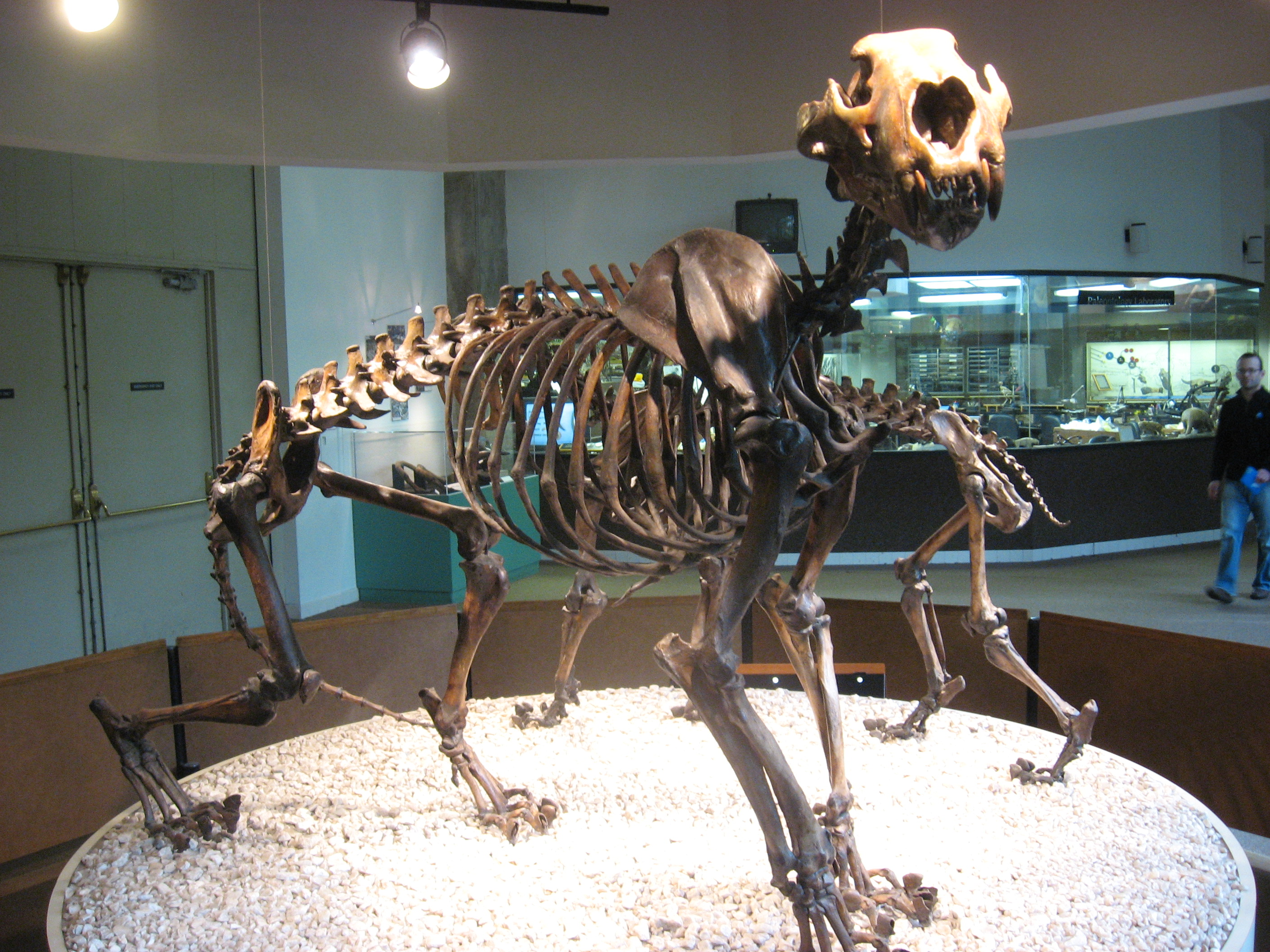 La Brea Tar Pits 2009